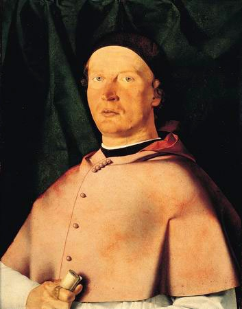 Il Ritratto di Bernardo de' Rossi di Lorenzo Lotto, è un quadro (olio su tavola, cm 55 x 43,5) che si trova a Napoli, nel Museo di Capodimonte (inv. Q 57), facente parte della Collezione Farnese. Portrait of Bishop Bernardo de’ Rossi // Capodimonte